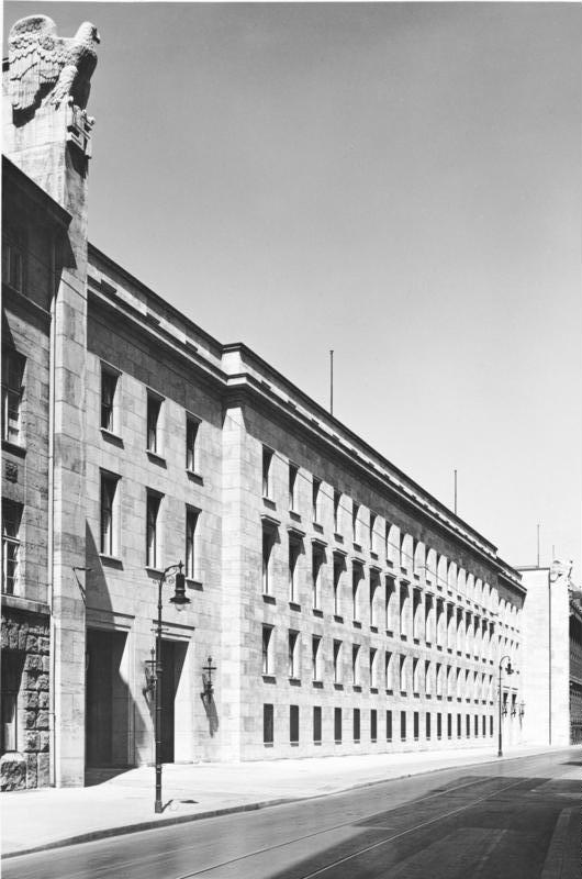 Propagandaministerium [1939] Negativ-Nr. 3065